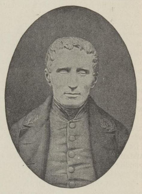 Louis Braille